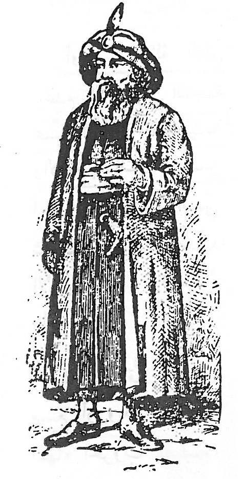 رسم للسلطان الظاهر بيبرس.